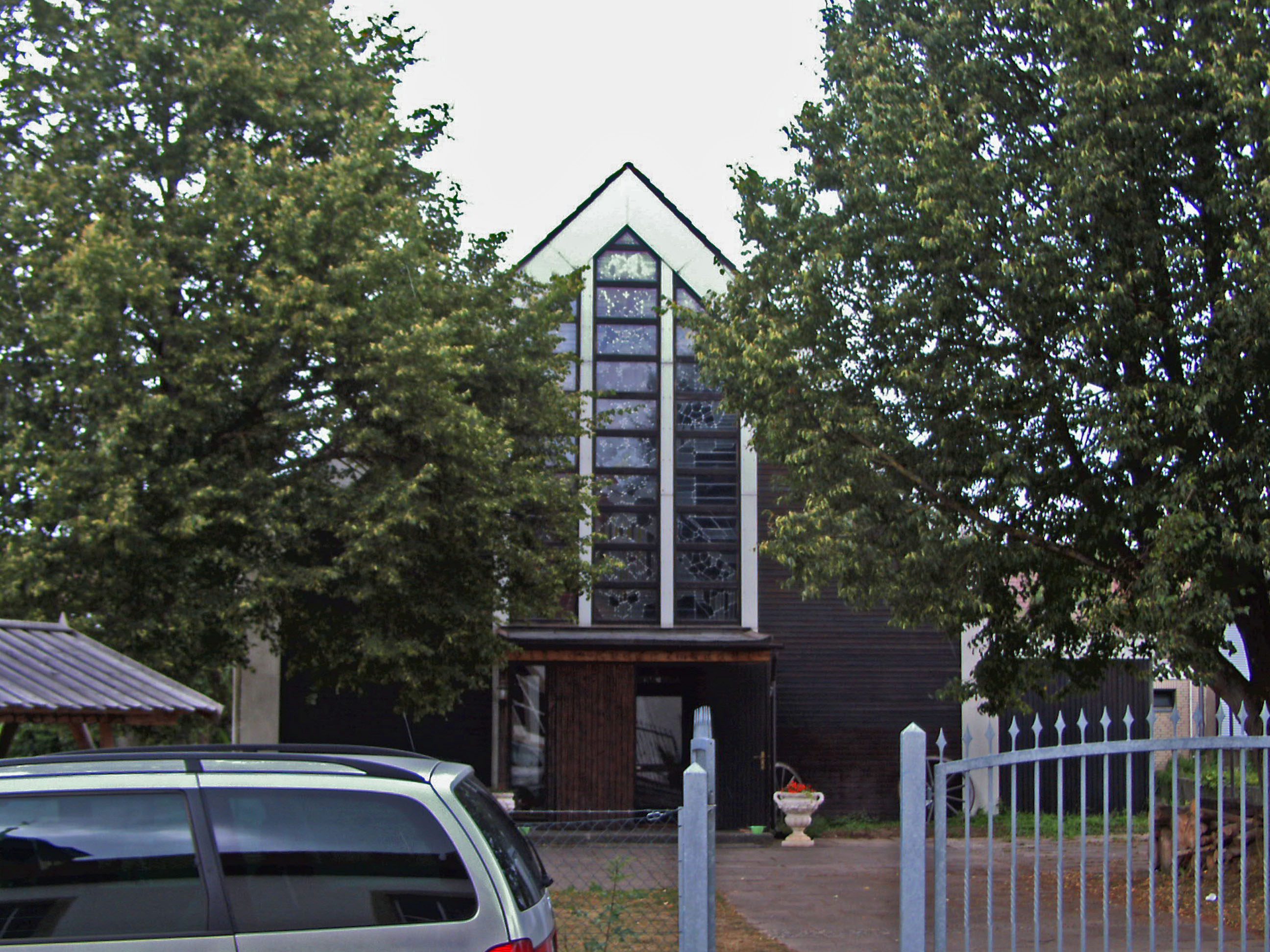 Ehemalige katholische Kirche "Hl. Familie" in Münchehof, Ortsteil von Seesen am Harz.